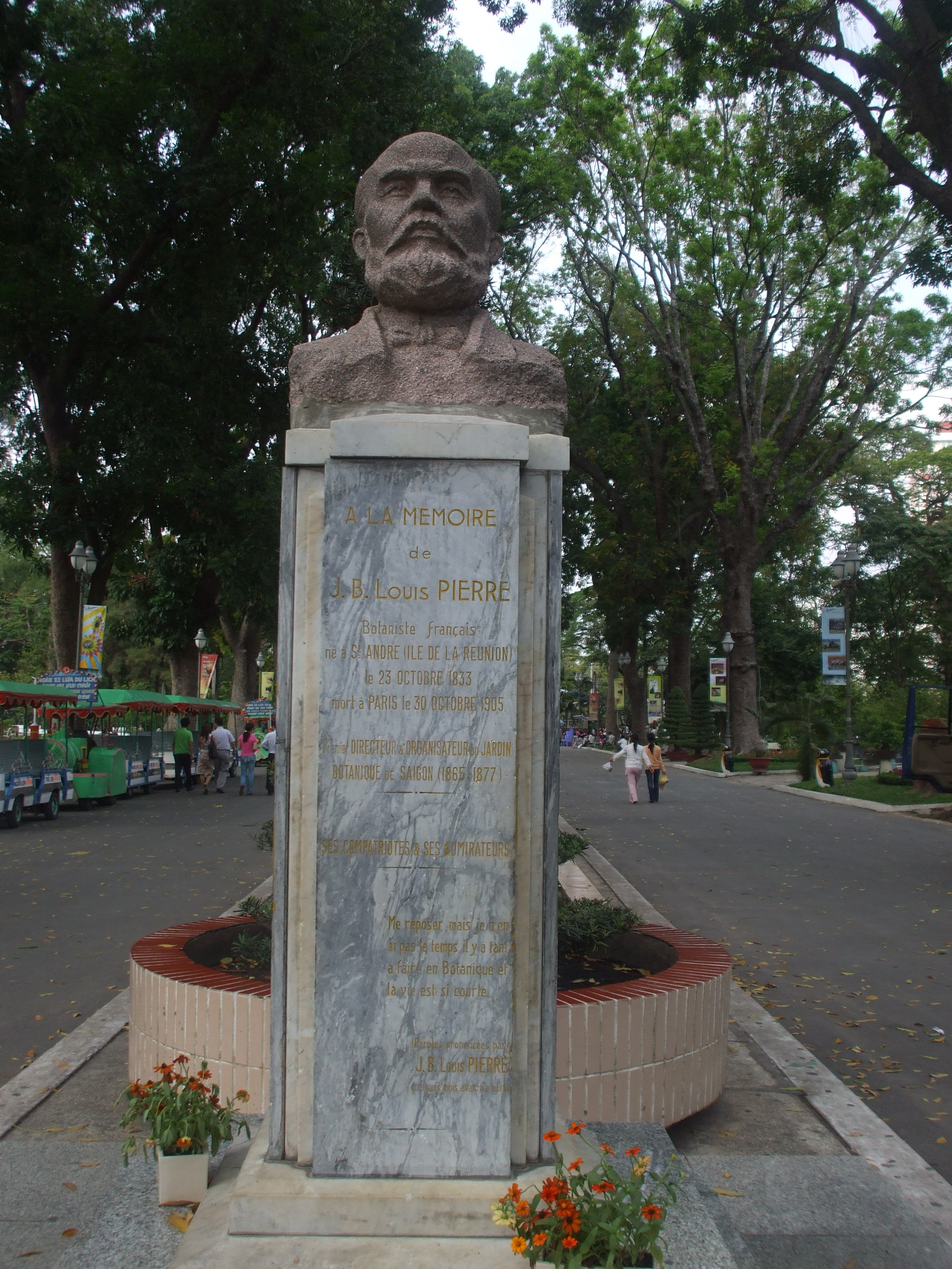 Tượng J.B. Louis Pierre, Người sáng lập kiêm giám đốc đầu tiên của Thảo Cầm Viên Sài Gòn, Thành Phố Hồ Chí Minh, Việt Nam.